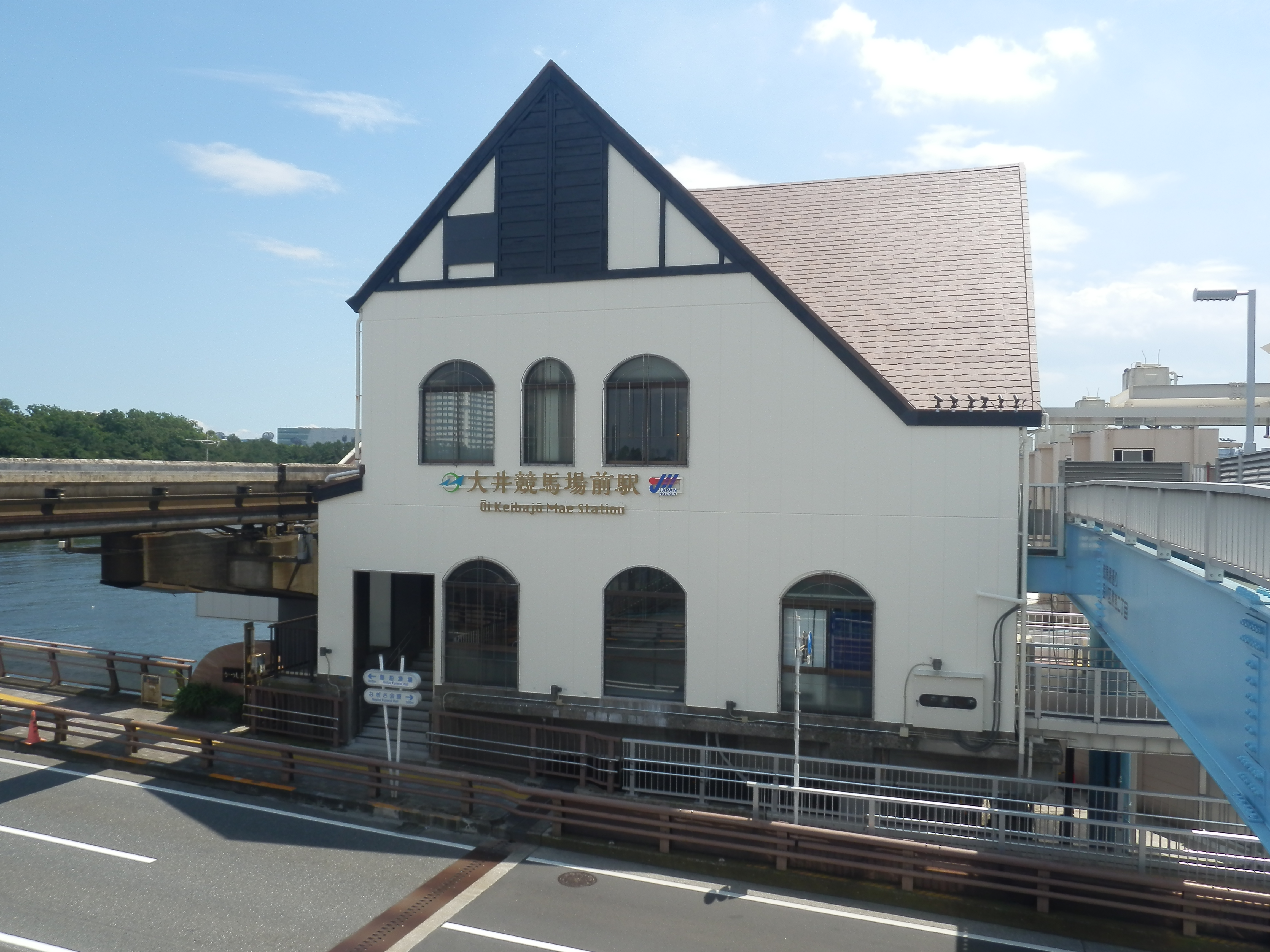 大井競馬場前駅駅舎